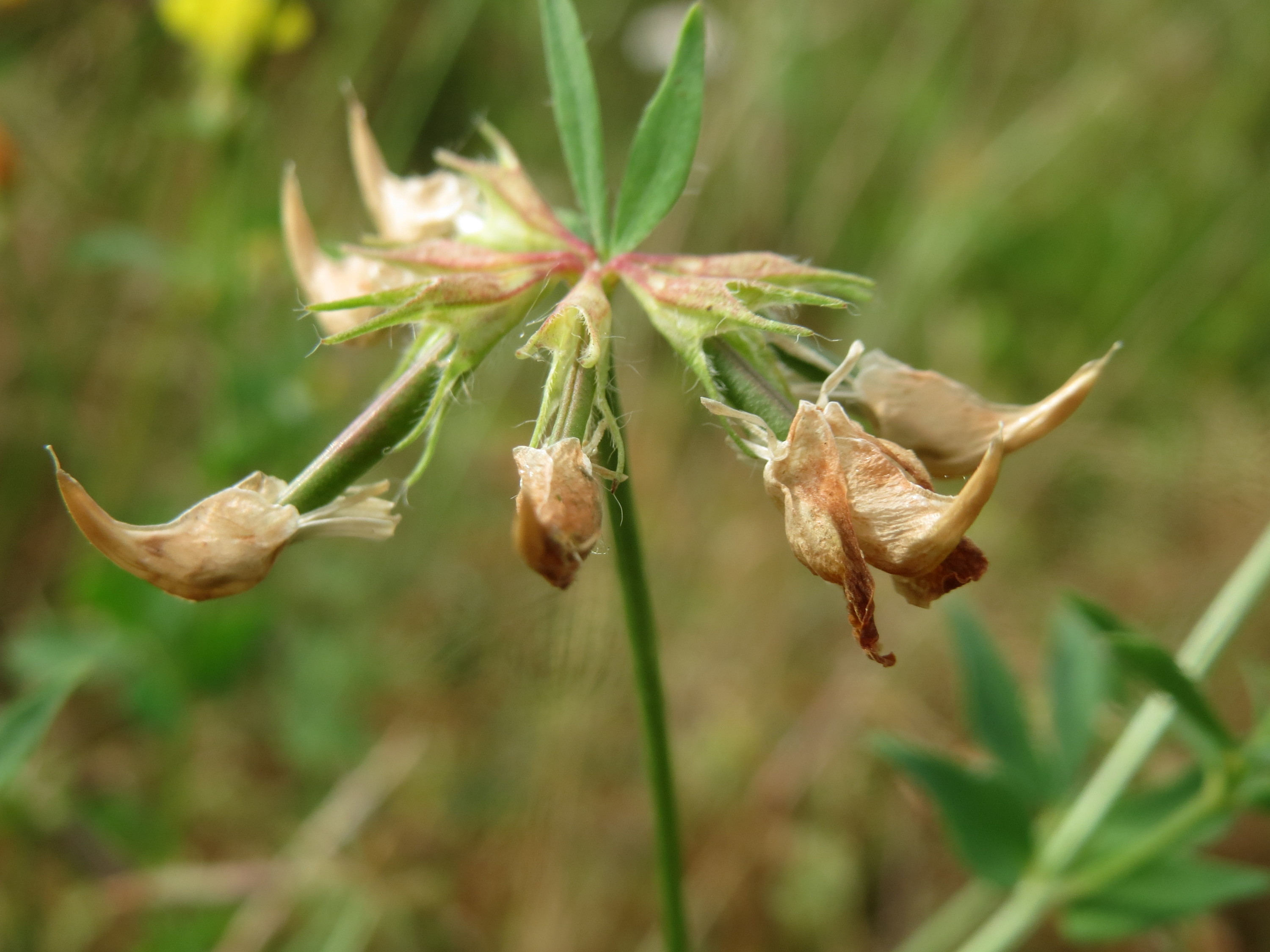 Gewöhnlicher Hornklee (Lotus corniculatus) am Osthafen Saarbrücken - auf einem Sand-Trockenrasen oberhalb des Osthafens finden sich einige standorttypische Pflanzen